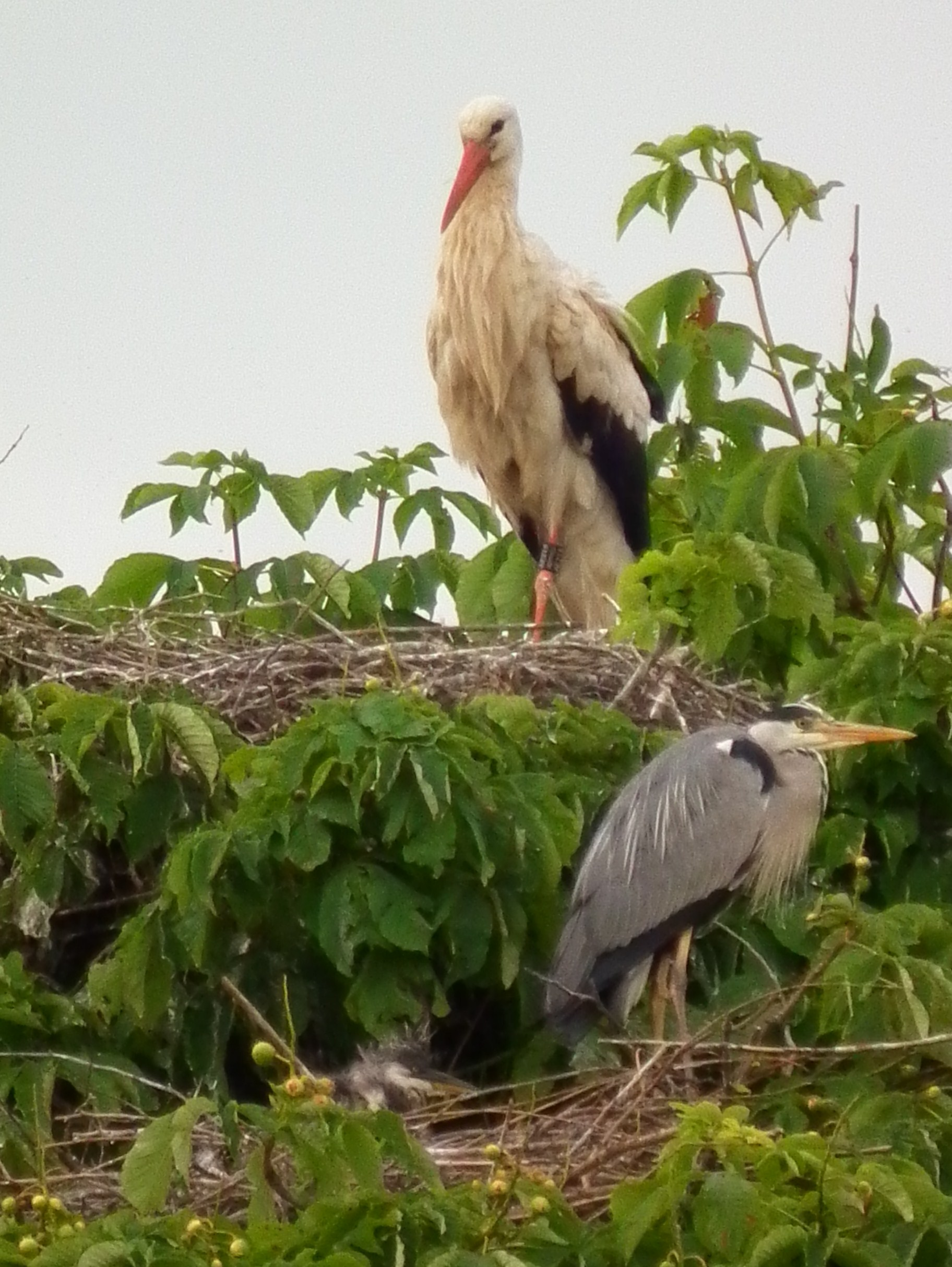 Weißstorch (Cionica ciconia) und Graureiher (Ardea cinerea) auf ihren Nestern in Nordbaden (Deutschland)